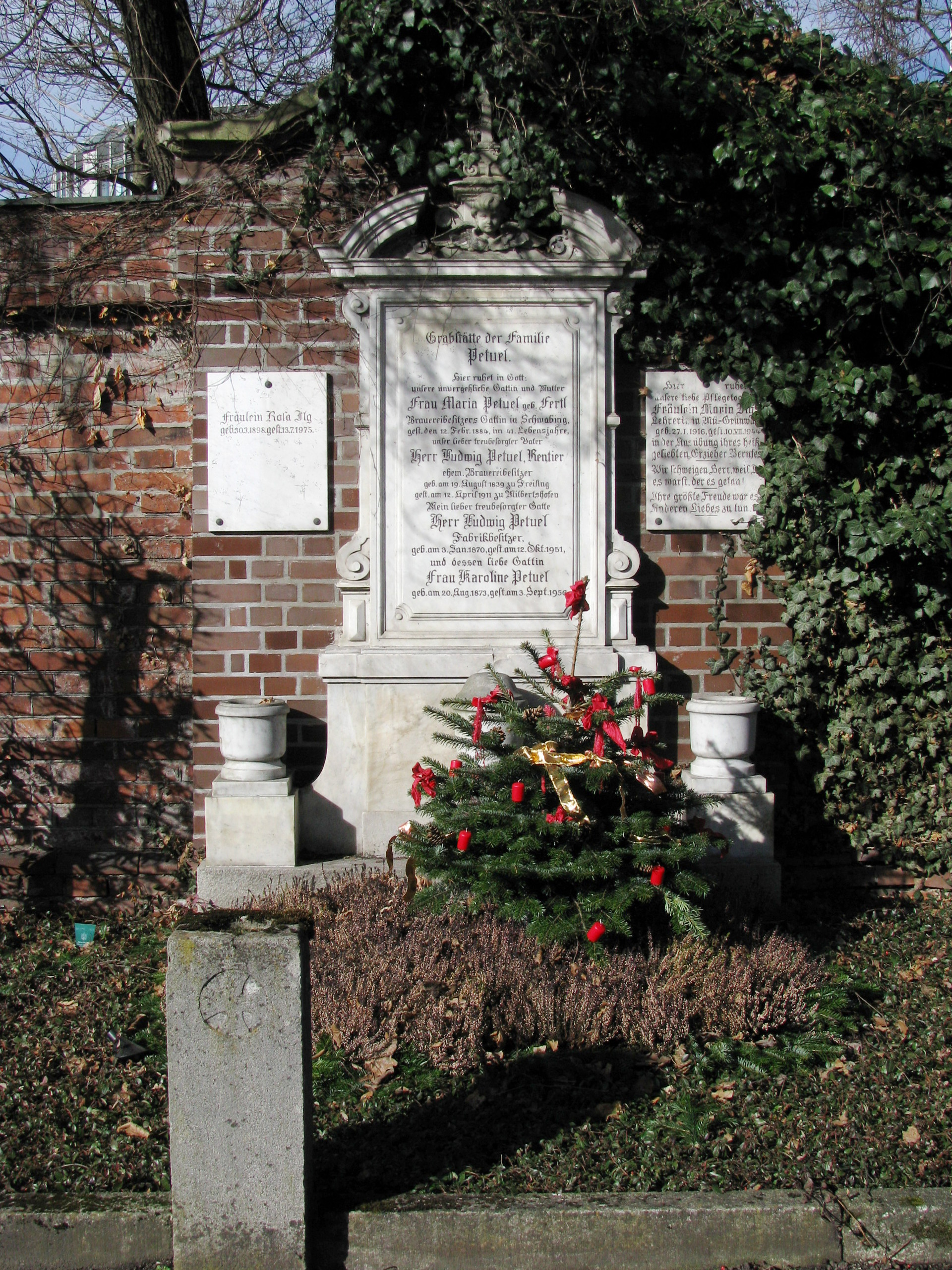 Grab der Familie Petuel im Münchner Nordfriedhof